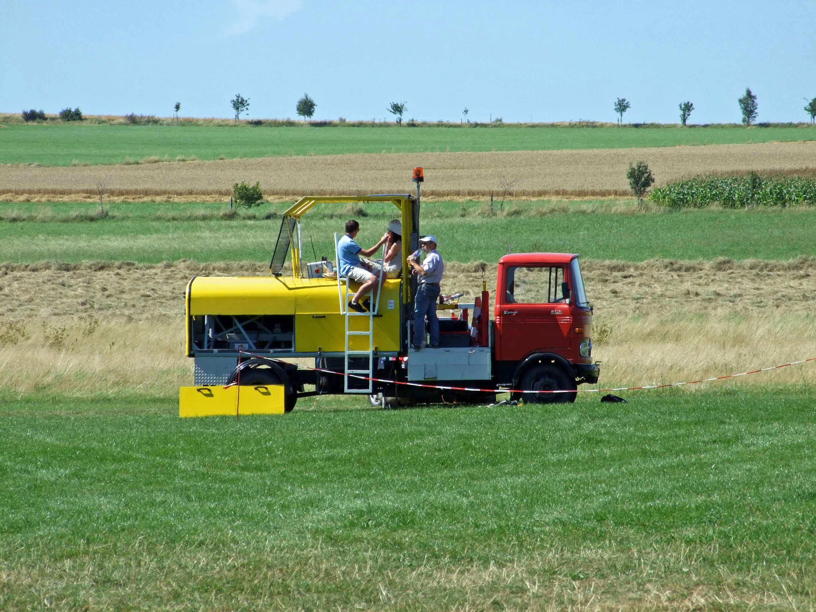 fahrbare Schleppwinde, Flugplatz Anspach Taunus